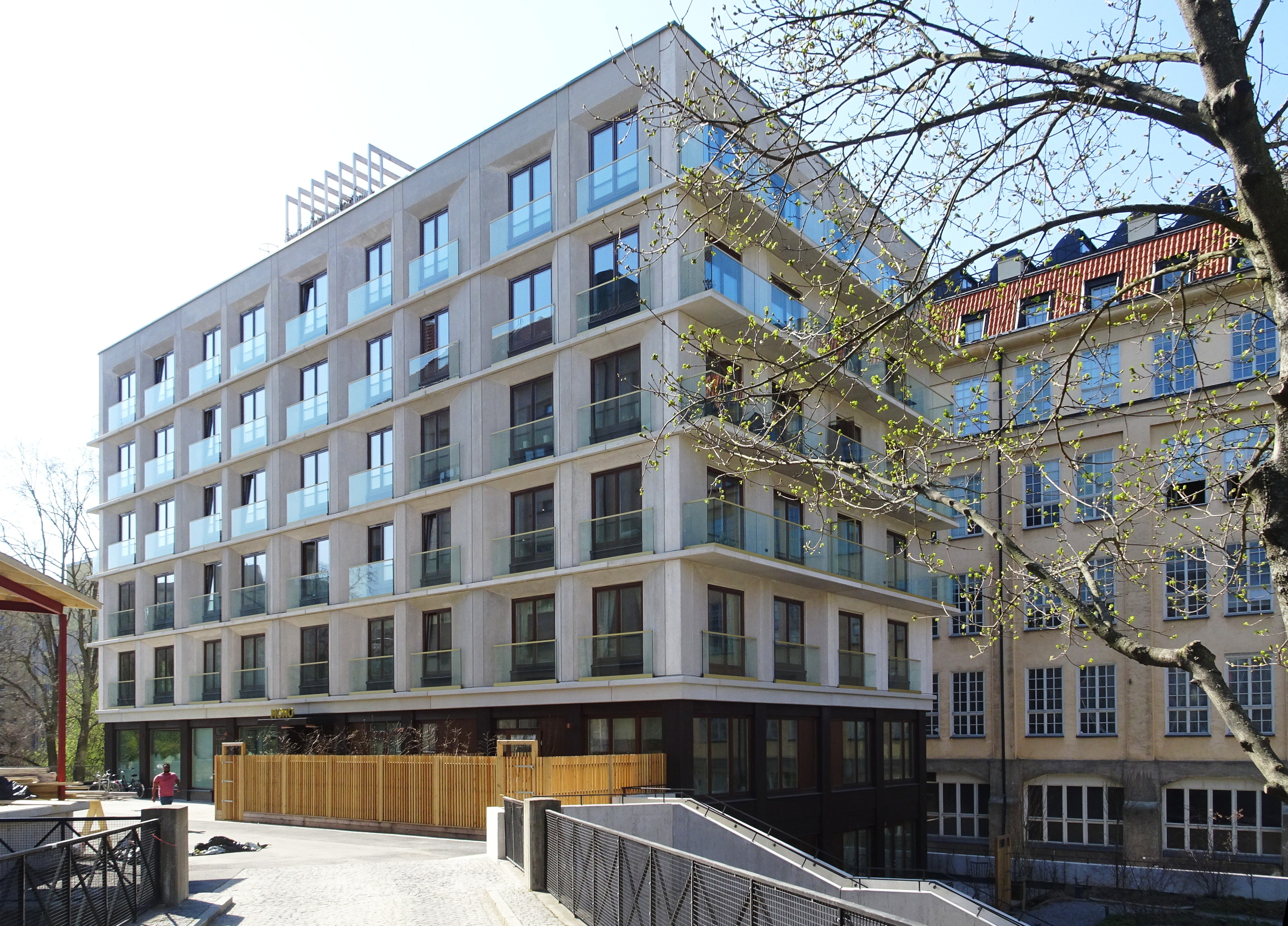 Flerbostadshus "Mono". Fastighet: Tobaksmonopolet 9 Adress: Maria Bangata 2B